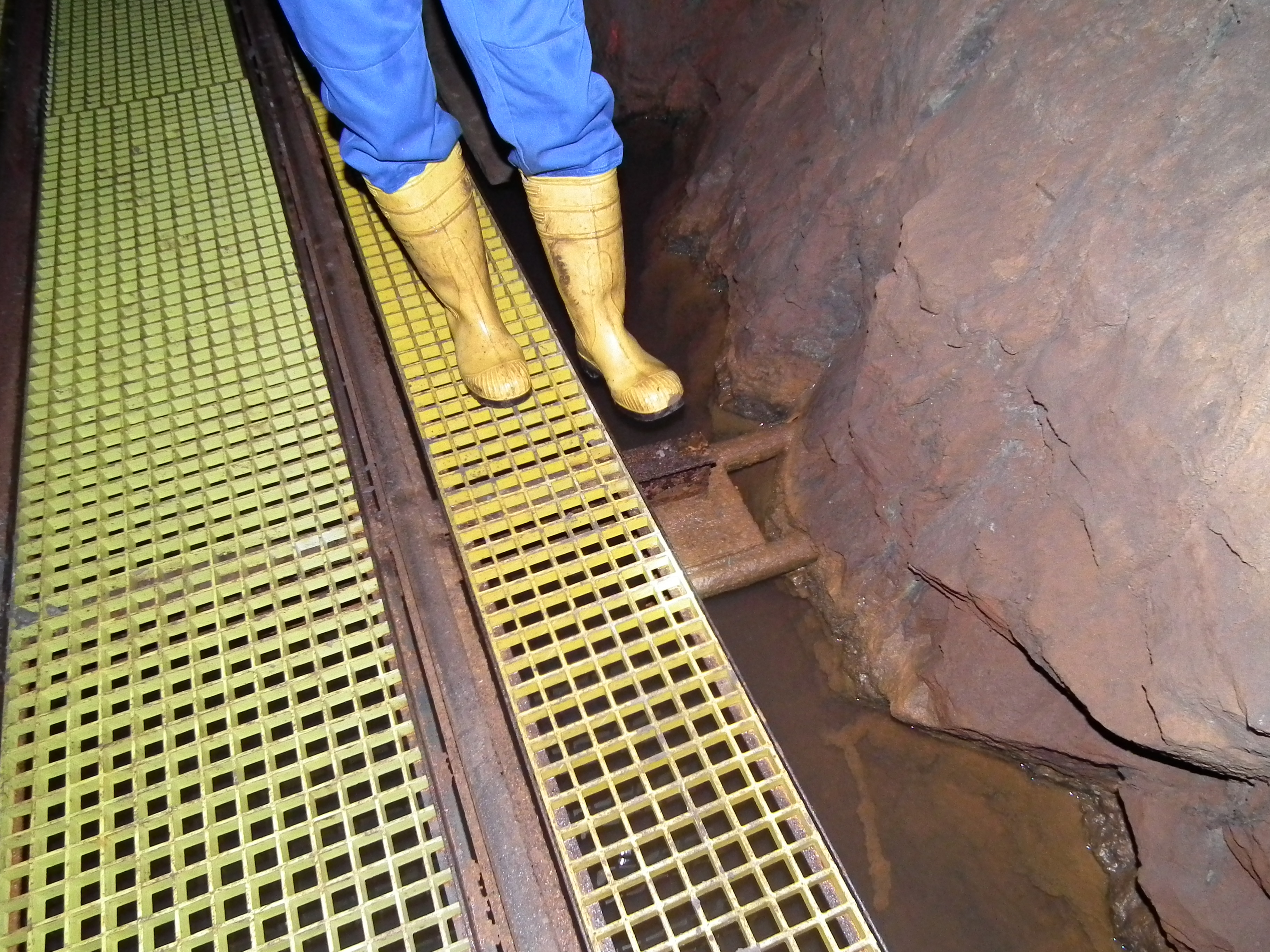 Neue gelbe Gitterroste wurden ab Sommer 2015 in den Tiefen Elbstolln eingebaut und erstetzen die alten Holzplanken. Unter dem Gitter sind ca. 40-50 cm Wasser.; Befahrung Wismut-Stollen und Tiefer Elbstolln am 17. September 2015